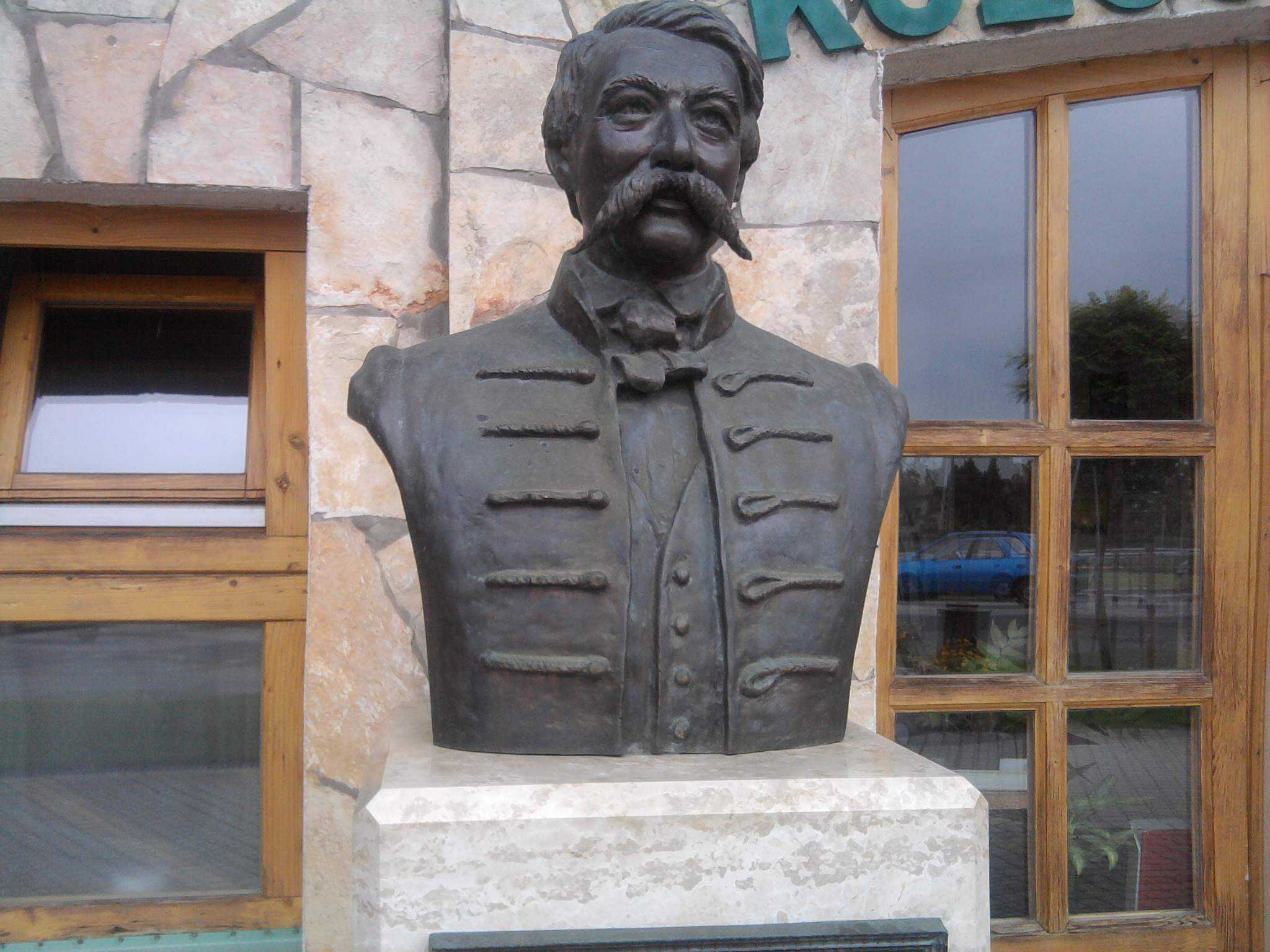 Gyál Arany János szobor (bronz) A szobrot Barthné Mezőfi M. Ilona szobrászművész ajándékozta a városnak 2006-ban. Háttérben az Arany János Közösségi Ház és Városi Könyvtár (Kőrösi út).